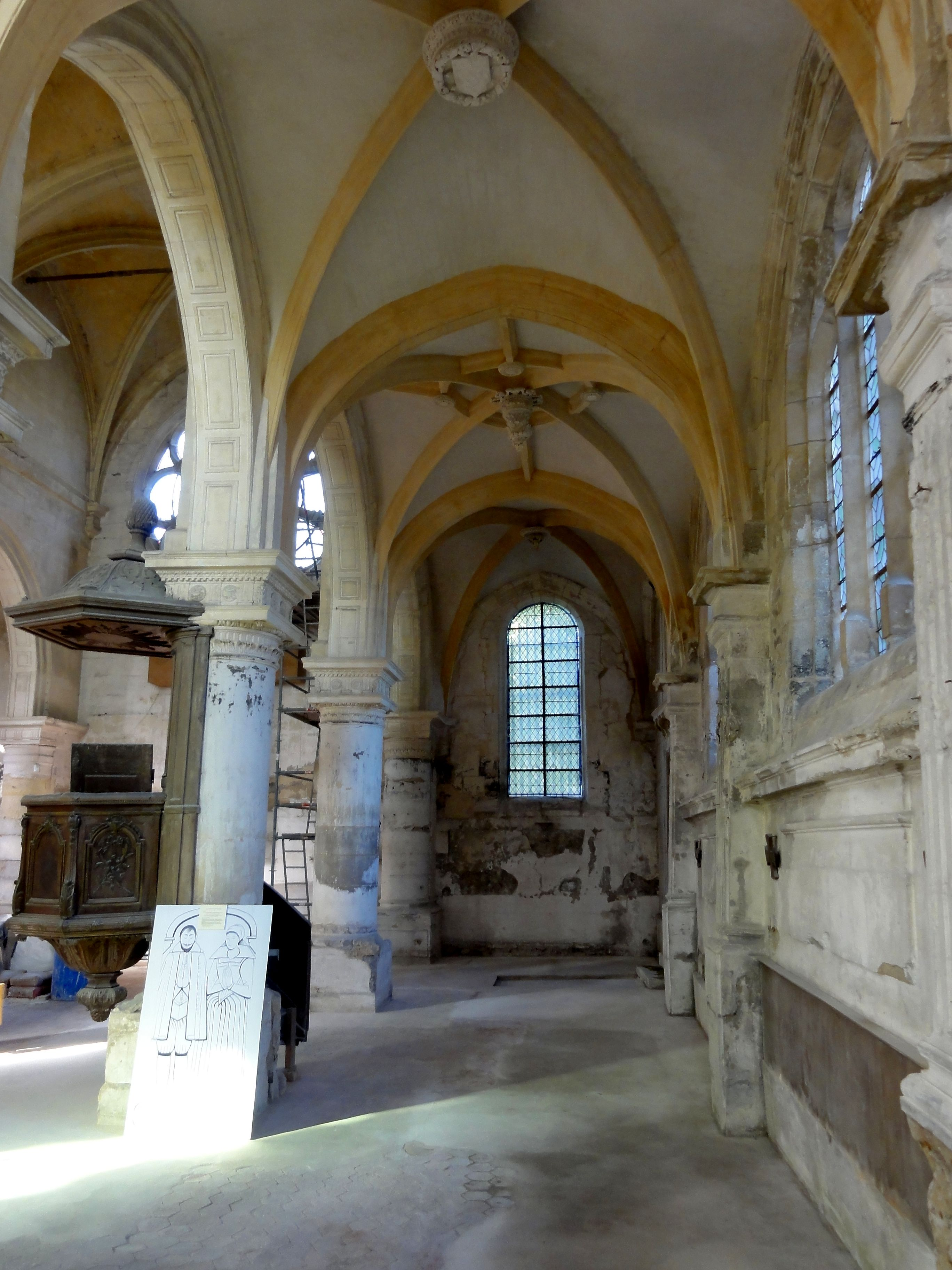 Bas-côté nord, vue vers l'ouest.